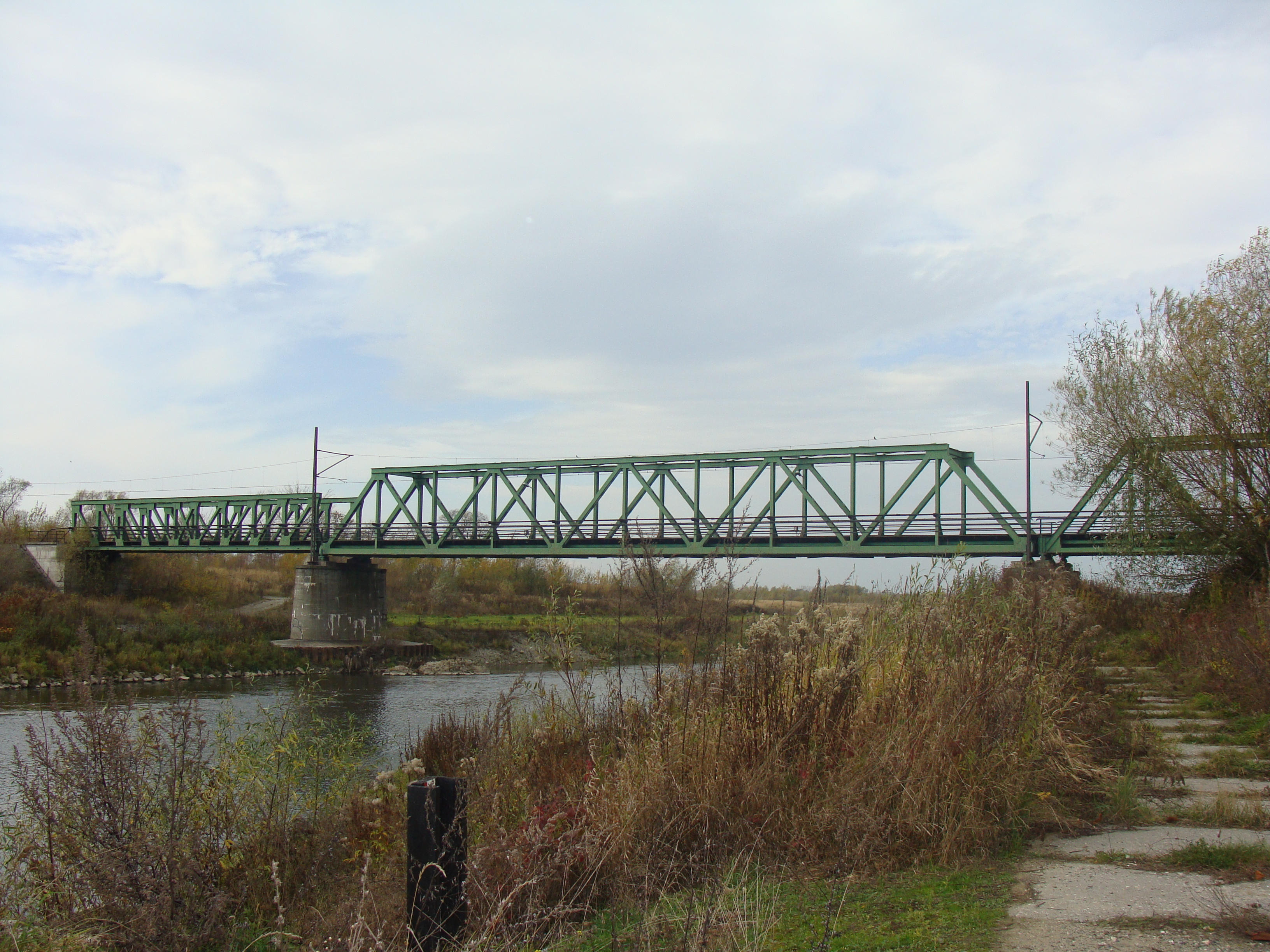 Most kolejowy linii nr 158 na rzece Odrze